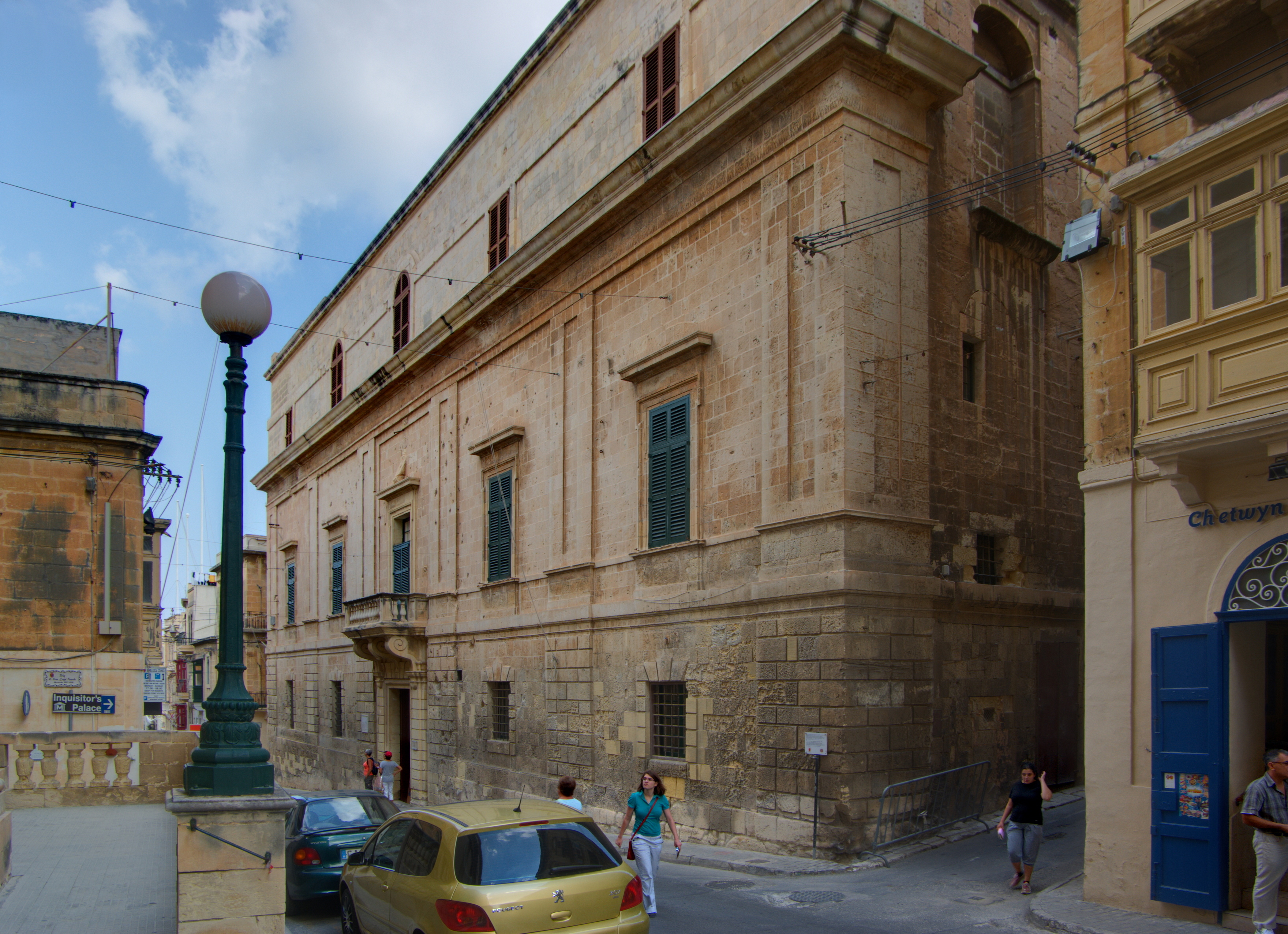 Malta Vittoriosa, Palast des Inquisitors